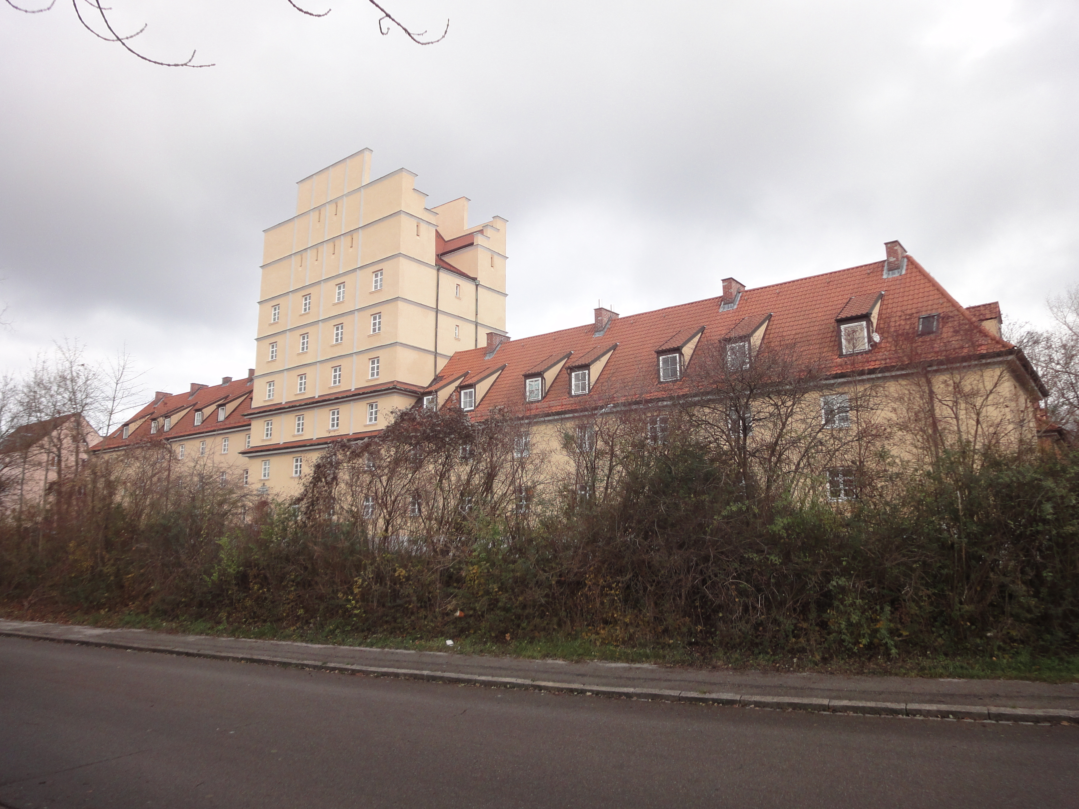 Lechseite